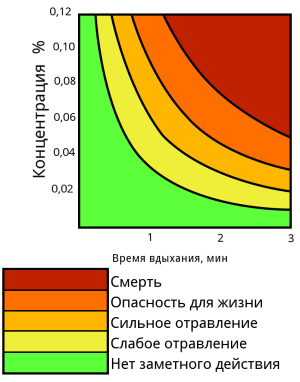 carbon monoxide poisonous action (Russian) GFDL license. Self-made.